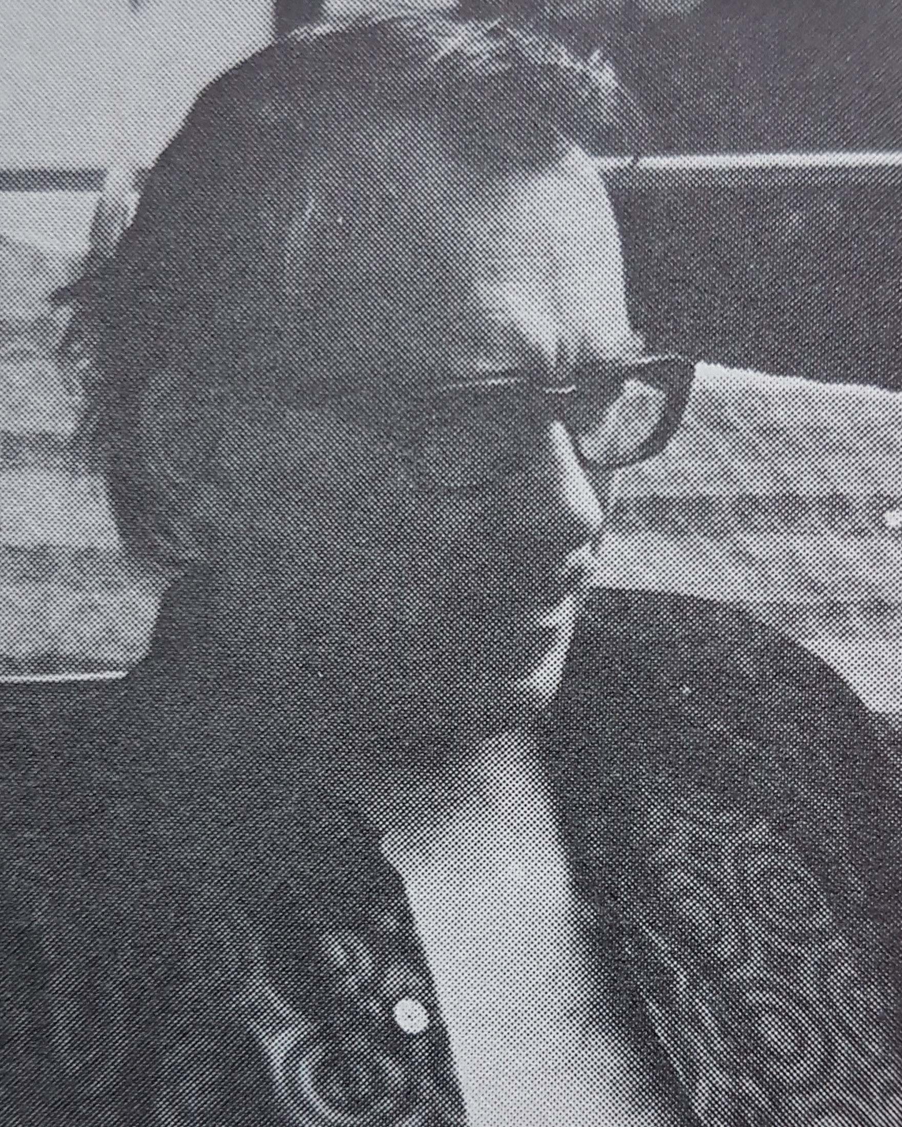 Sven Frödin Artist.from Sweden